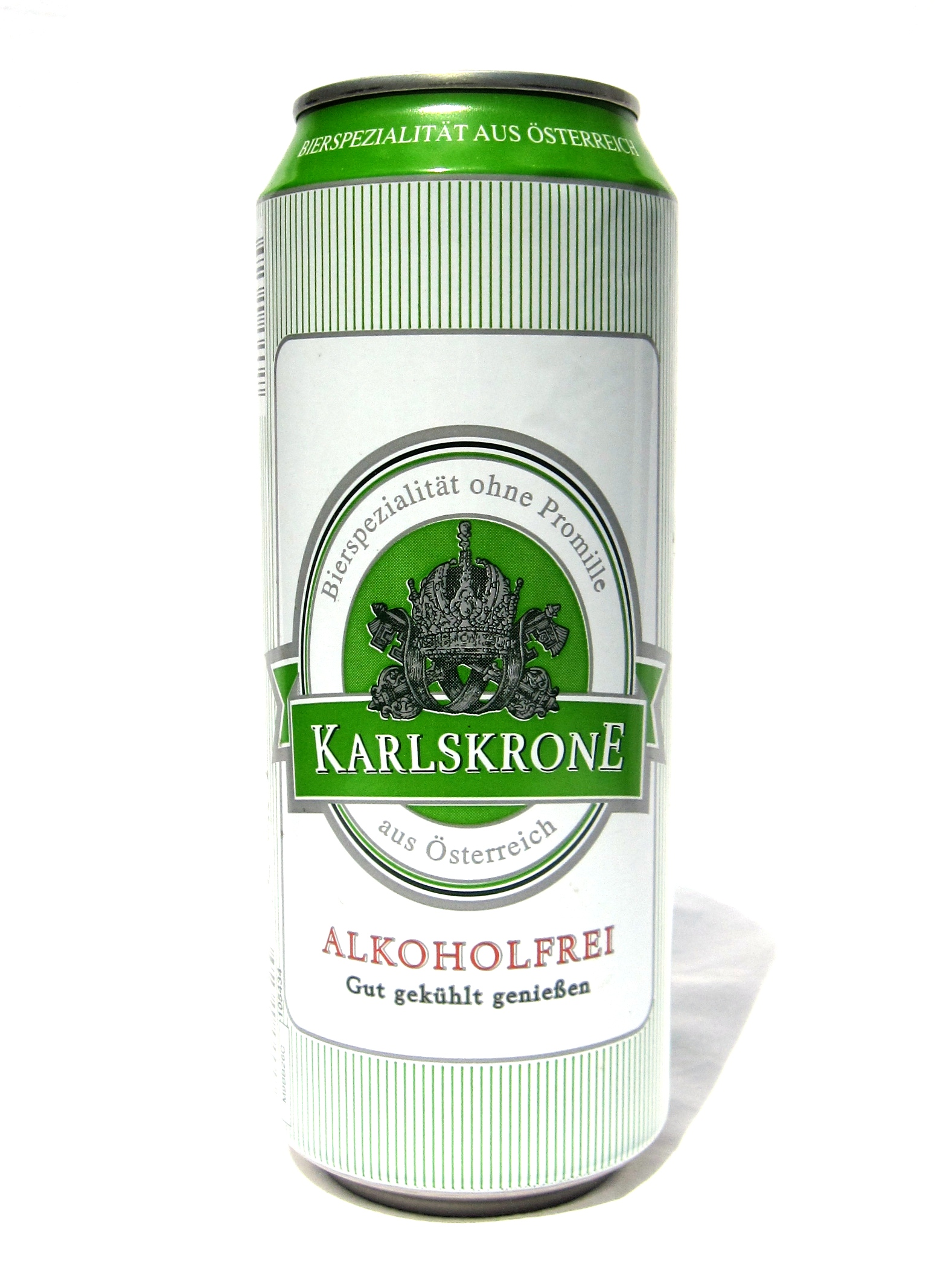 Karlskrone Beer